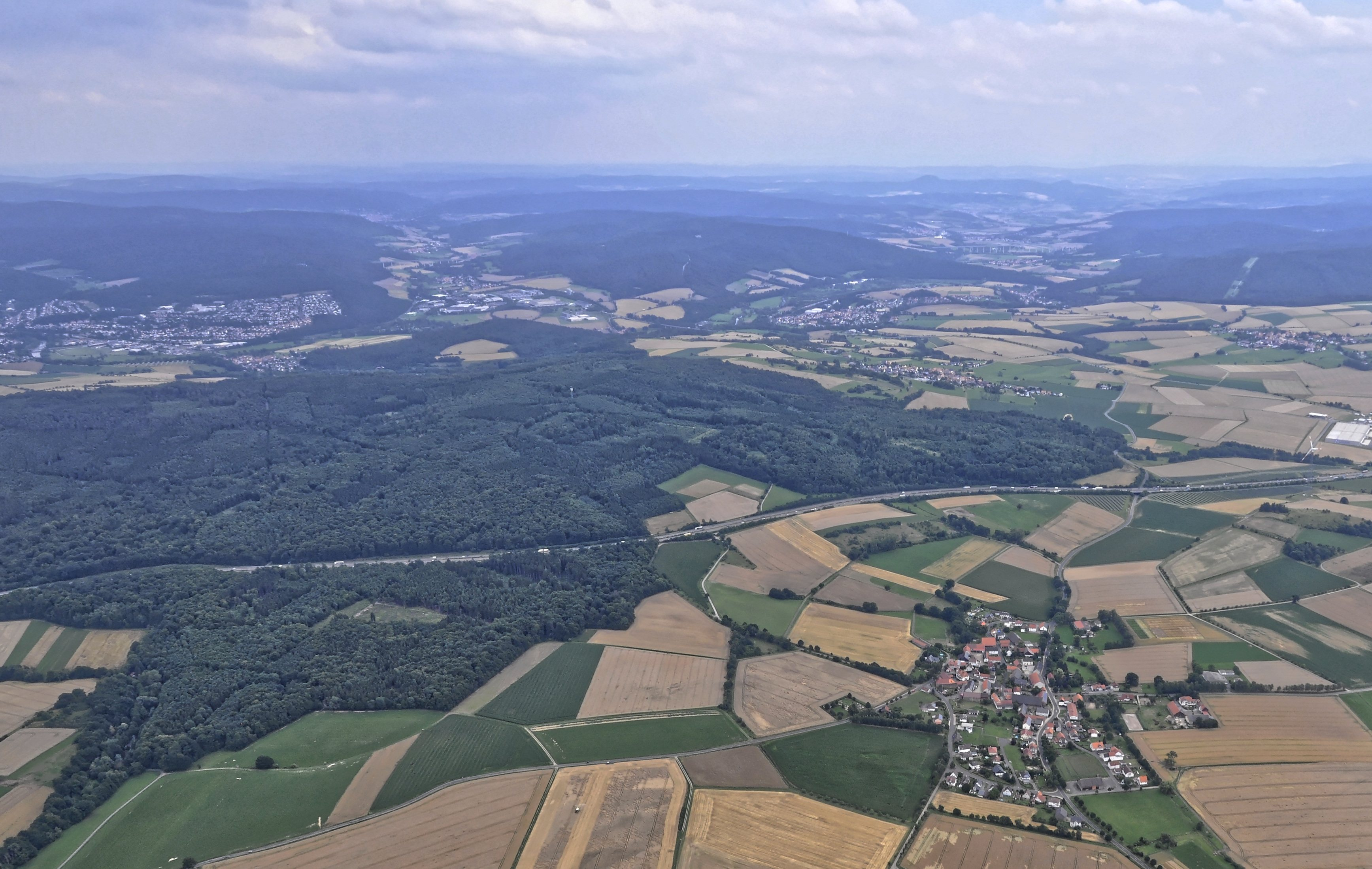 Bilder vom Flug Nordholz-Hammelburg 2015: Hilgershausen, Stadtteil von Felsberg in Nordhessen. Quer durch die Bildmitte die Autobahn A 7, die hier den Markwald Beuerholz durchschneidet; am Bildrand links Melsungen.